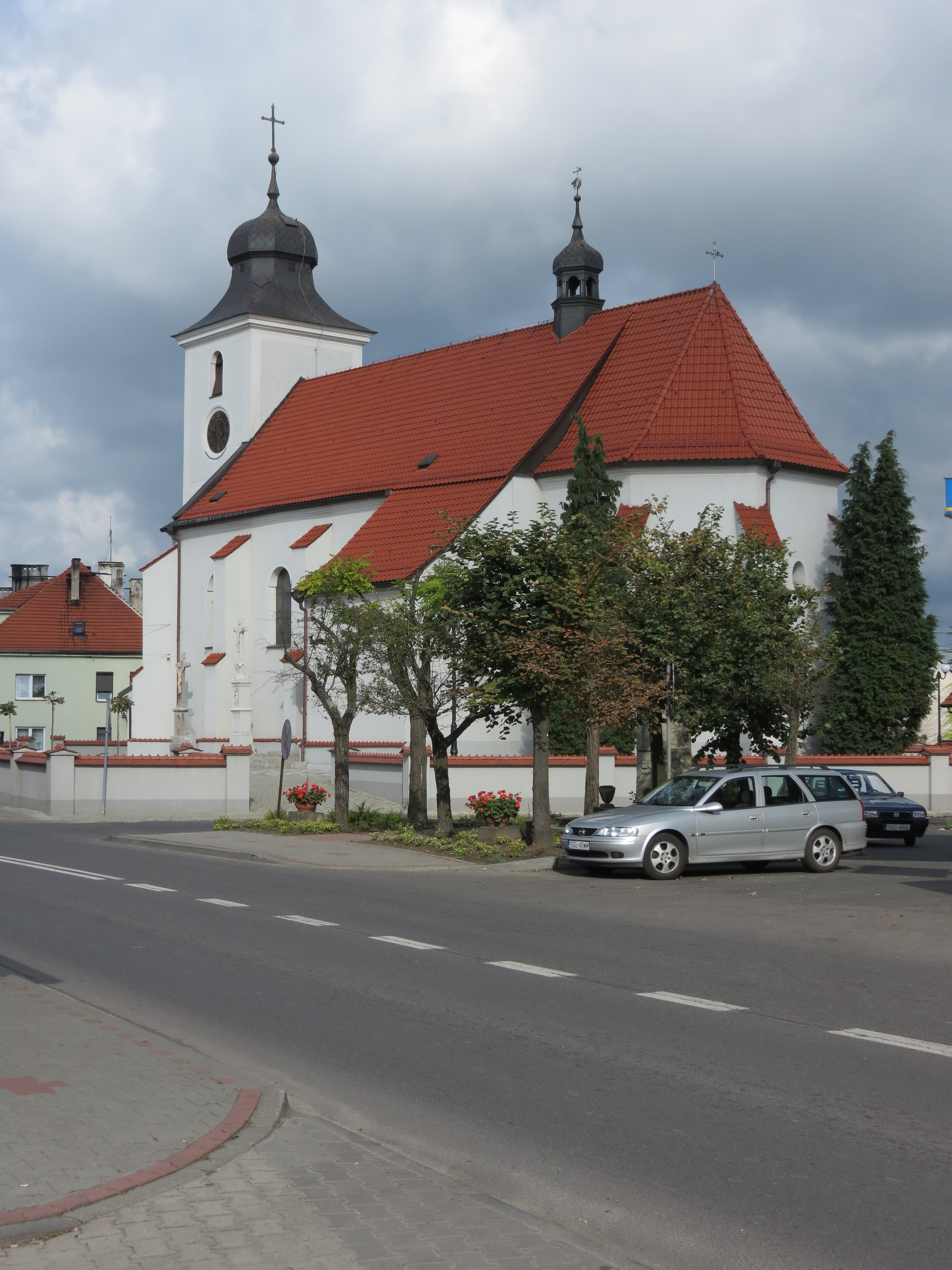 Sośnicowice, ul. Kościelna - kościół parafialny p. w. Św. Jakuba